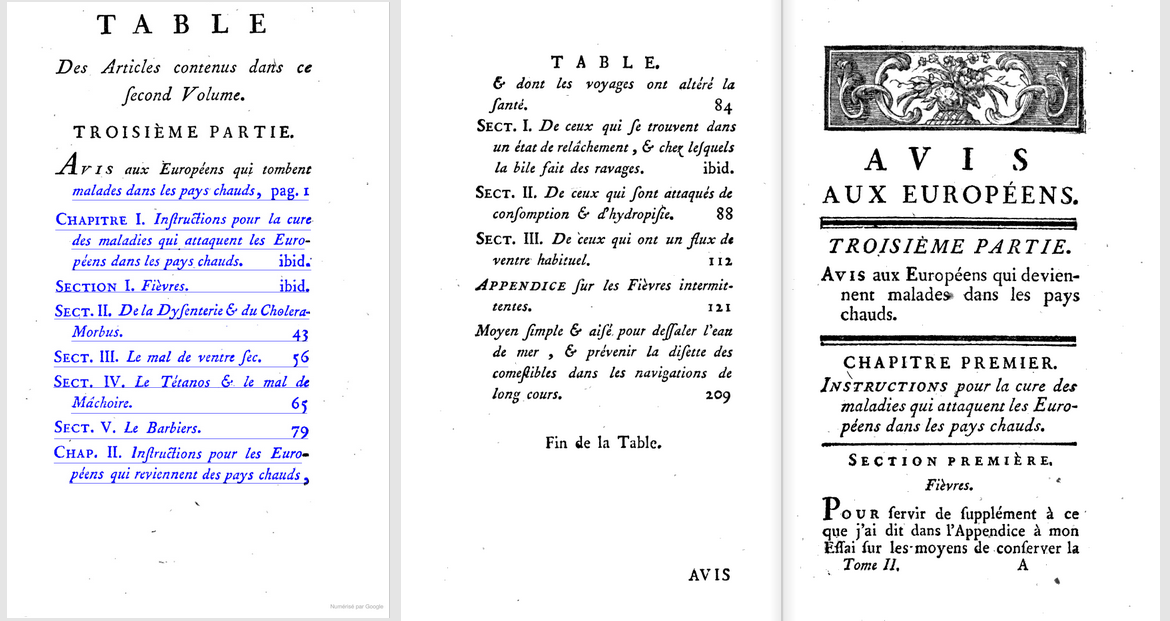 James Lind, Essai sur les maladies des européens dans les pays chauds et les moyens d'en prévenir les suites: suivi d'un appendice sur les fièvres intermittentes & d'un mémoire qui fait connoitre une méthode simple pour dessaler l'eau de mer, traduction Claude-Esprit Thion de la Chaume, 1785 ː table des matières.